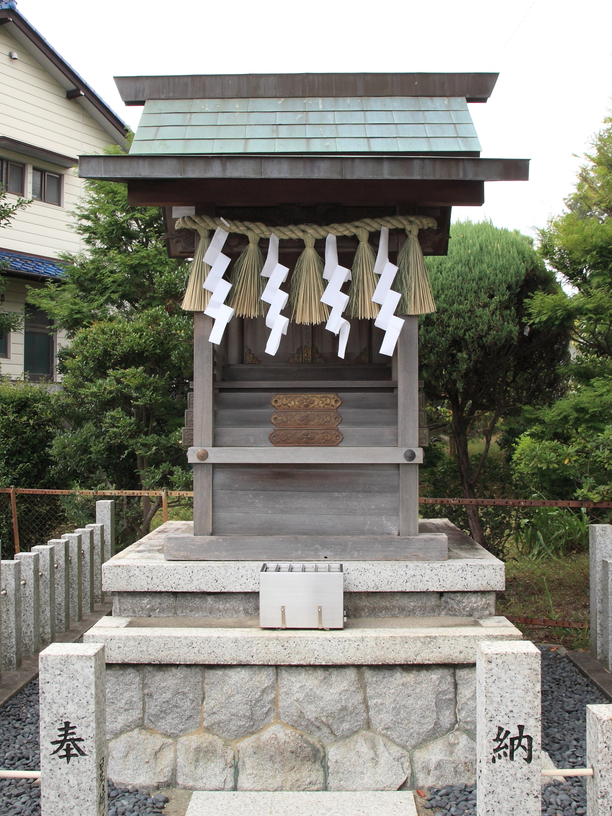 桶狭間神社（豊明市栄町、2012年）